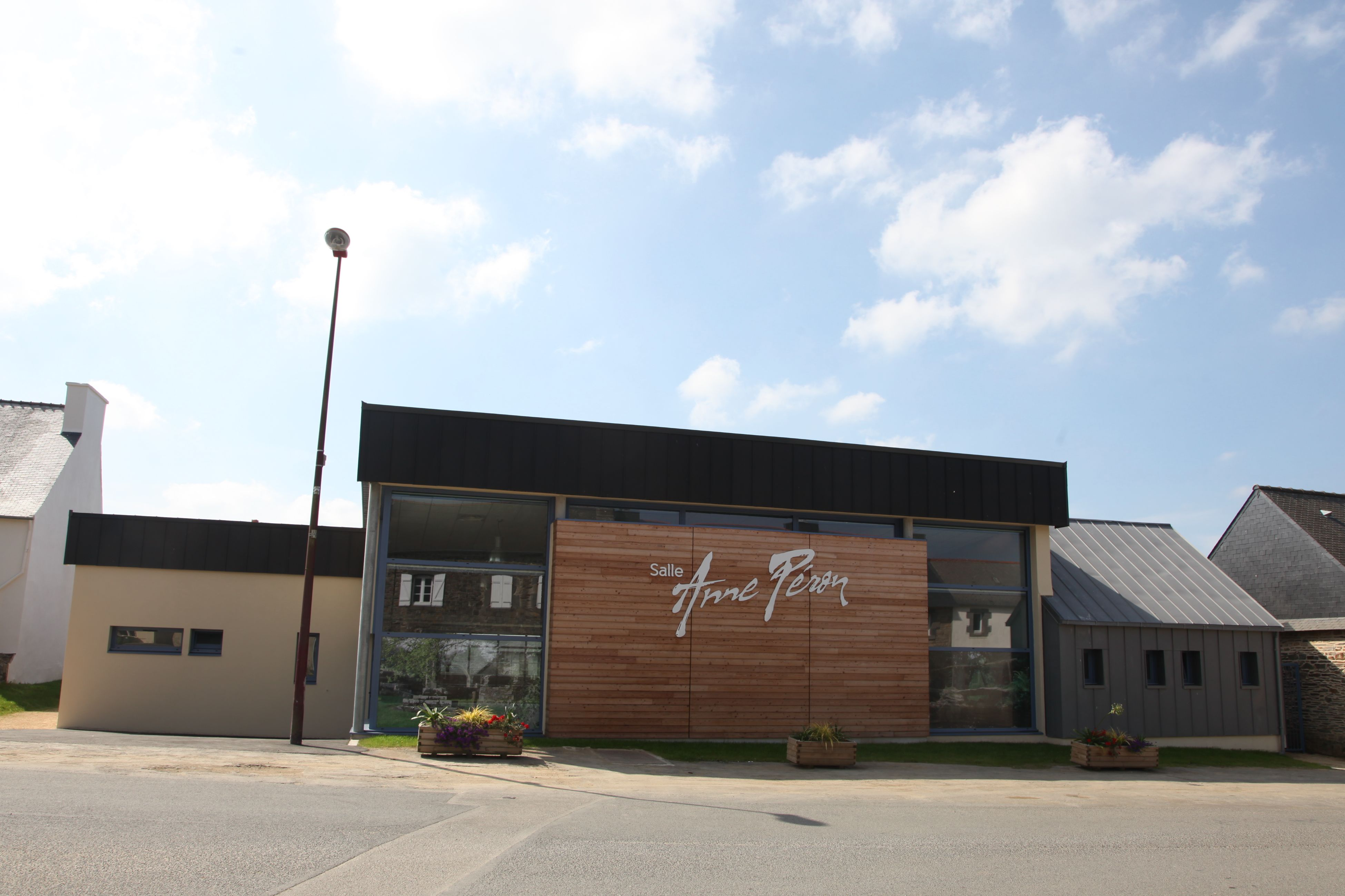 Salle multifonctions Anne-Péron d'Hanvec